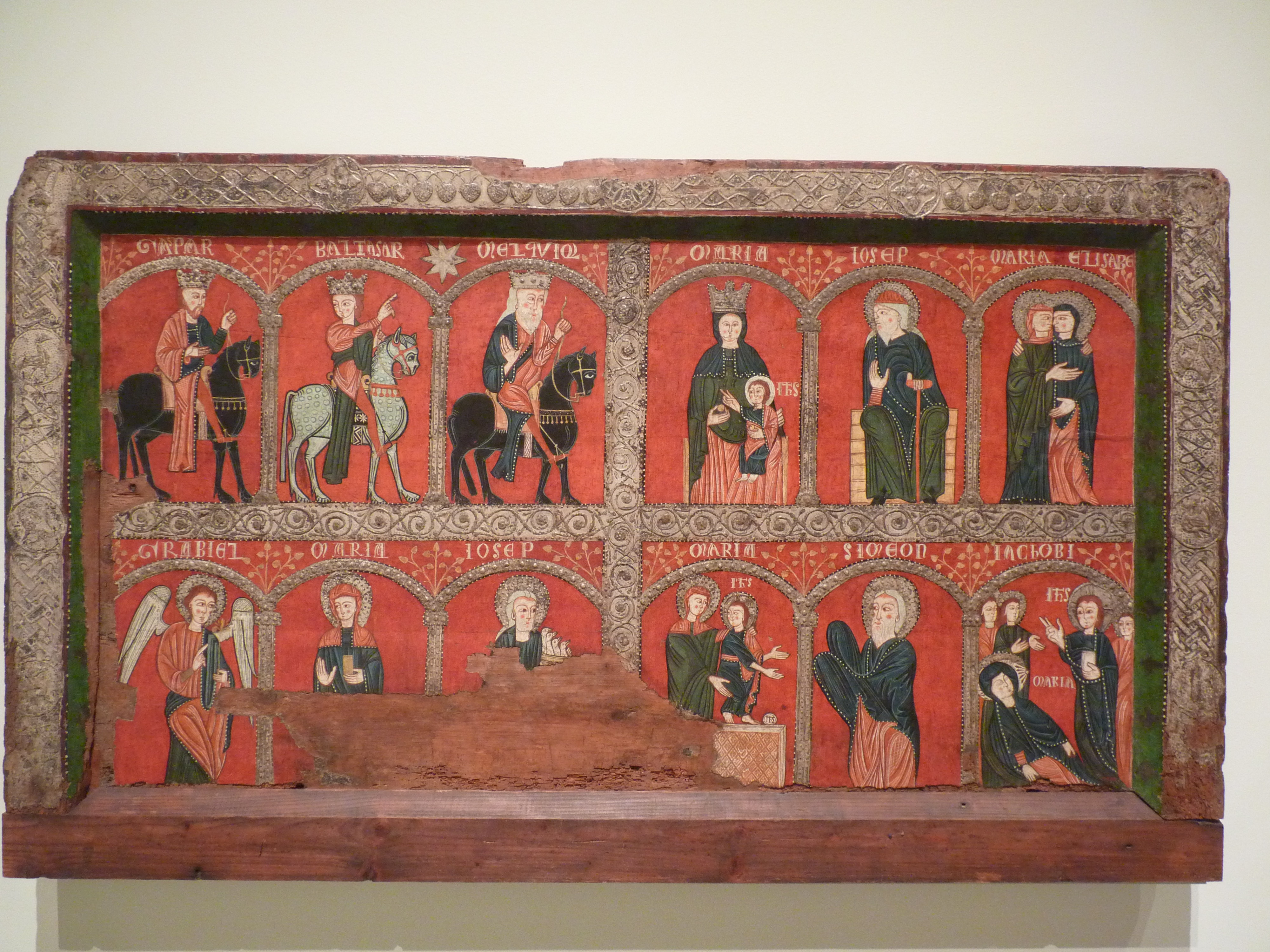 Frontal d'altar de Mosoll. ANÒNIM. CATALUNYA. TALLER DE LA SEU D'URGELL DEL 1200. Primer terç del segle XIII